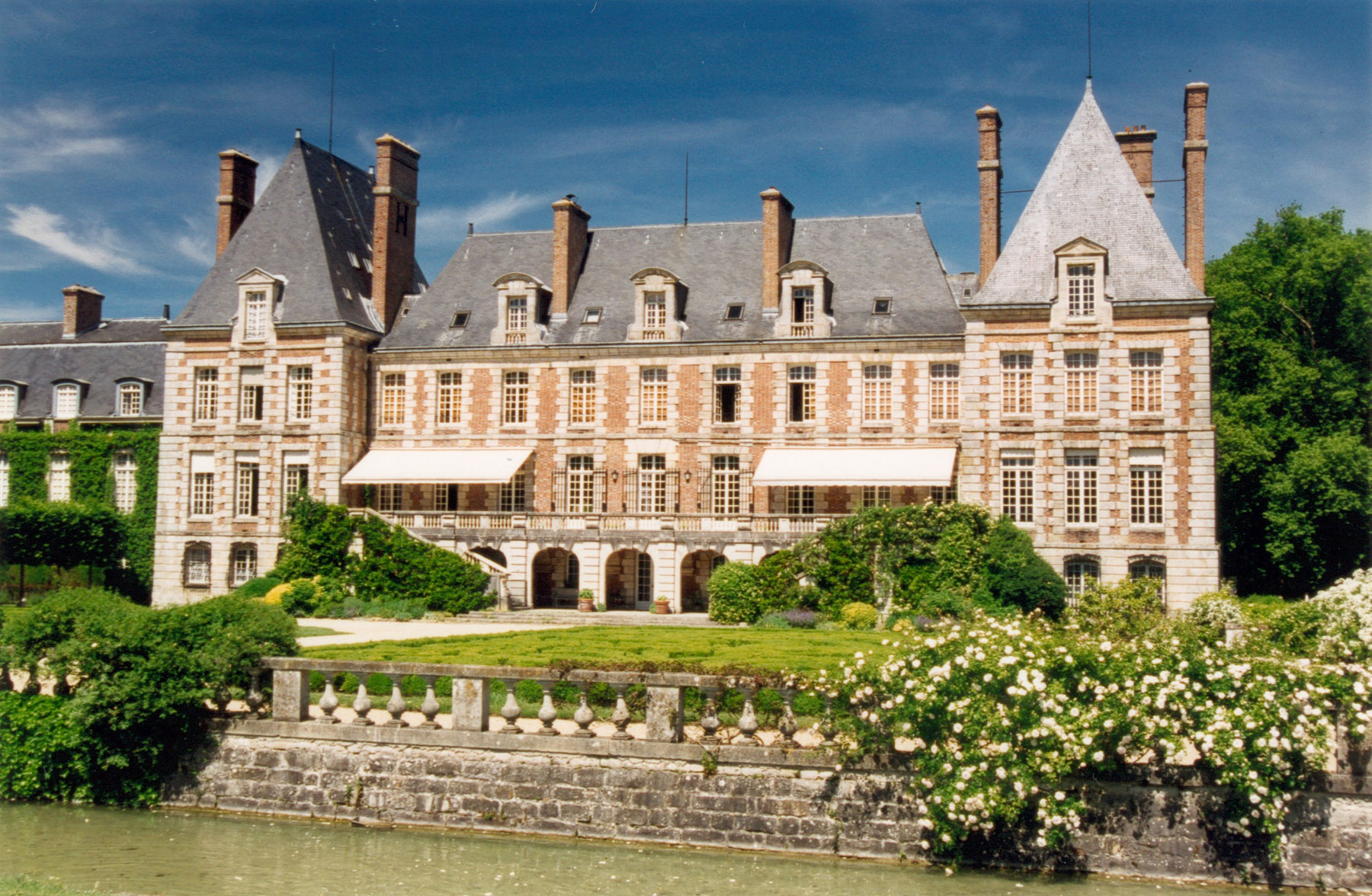 Château de Courances (Essonne, France) côté jardin